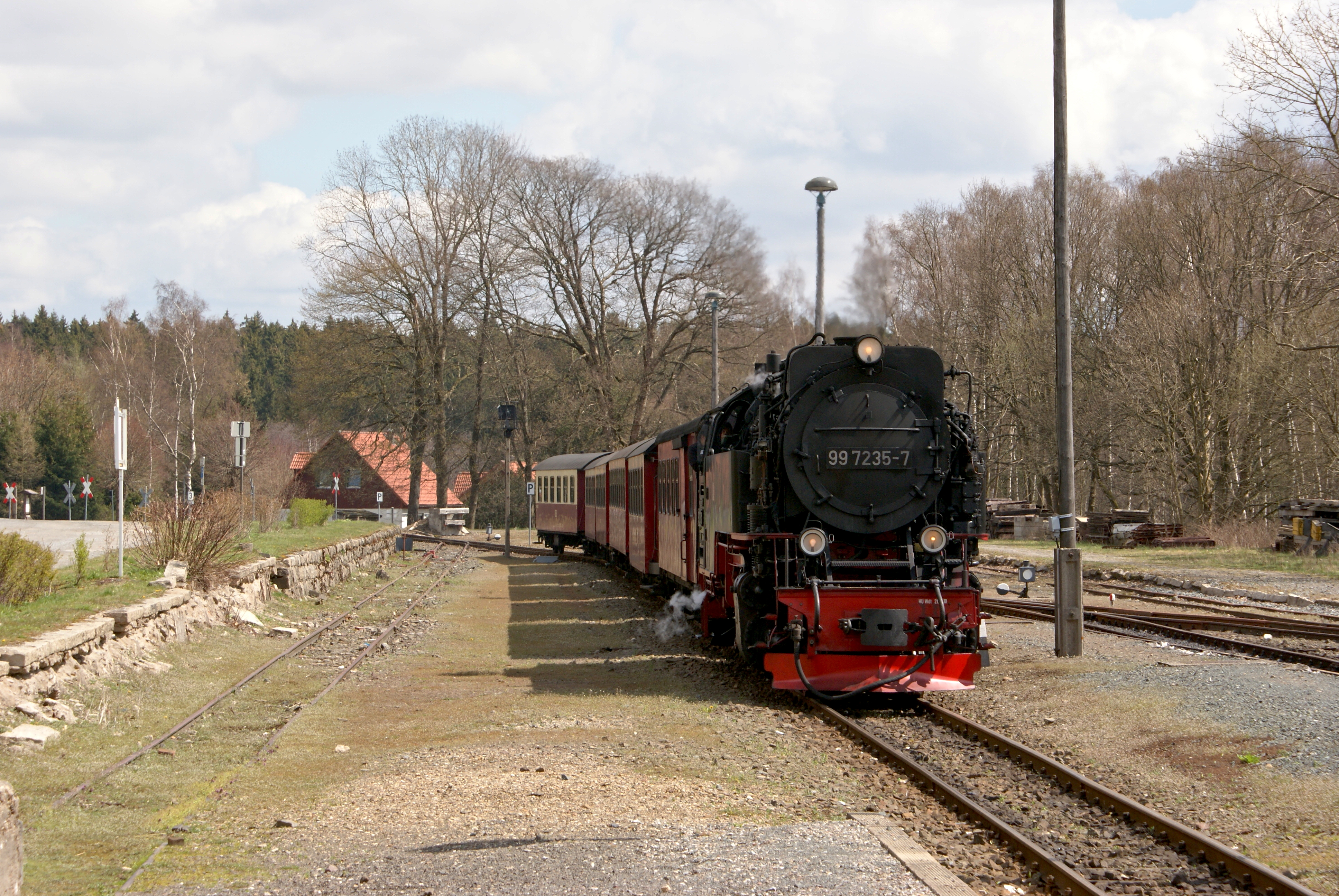 Bahnhof Elend der HSB mit Reisezug geführt von der Dampflokomotive 99 7235 am 25.April 2012